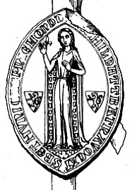 Mahaut de Béthune